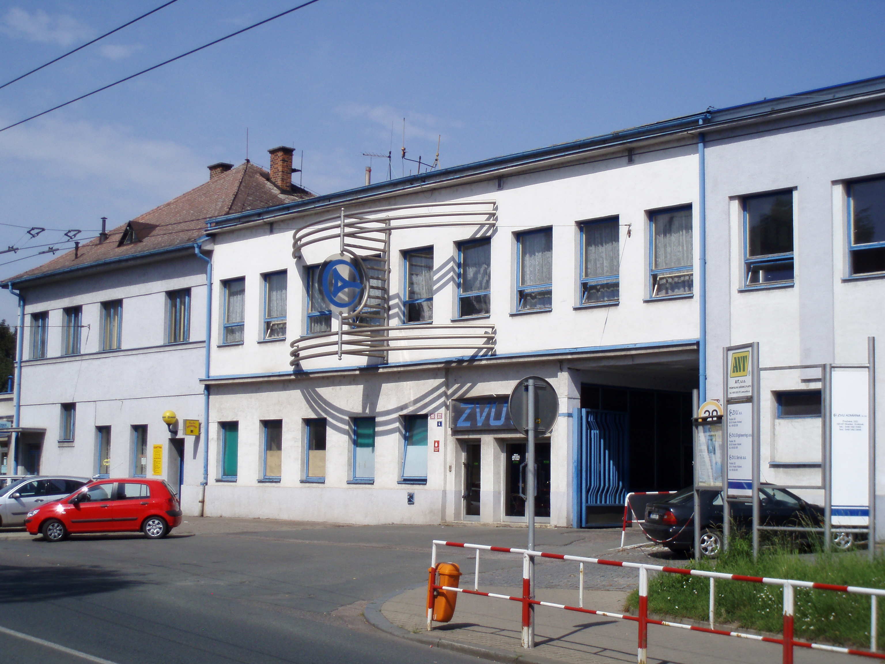 Areál ZVU, bývalých Závodů Vítězného února